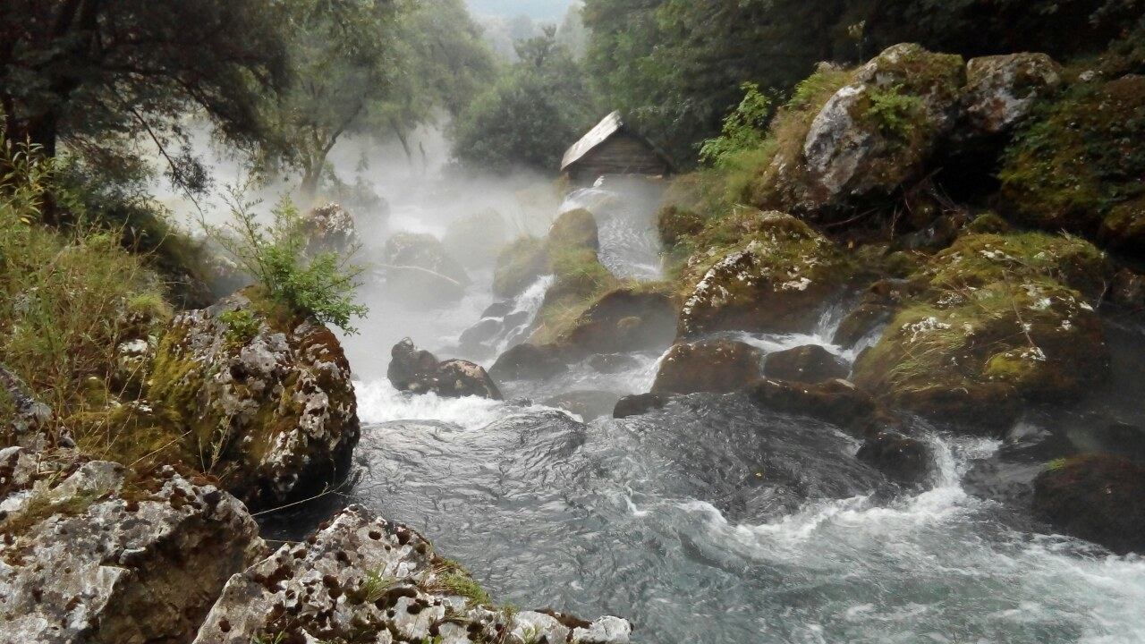 Krupski slapovi.